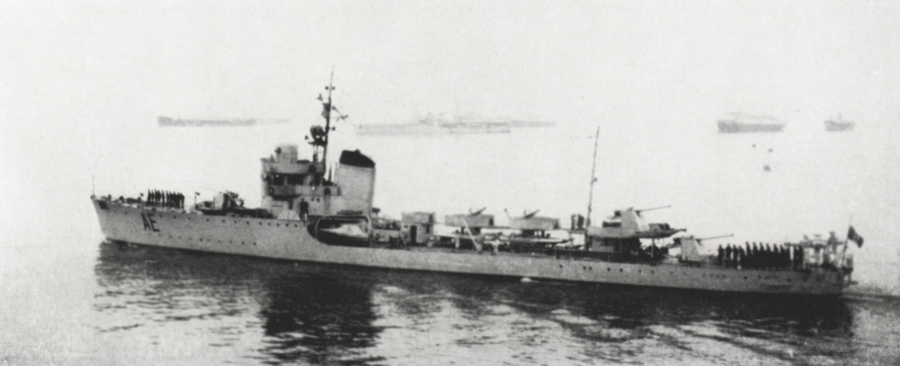 La torpediniera Ariel AE a Taranto nel 1939. Foto tratta dal volume dell'U.S.M.M. LE TORPEDINIERE ITALIANE 1881-1964 2A Edizione 1974